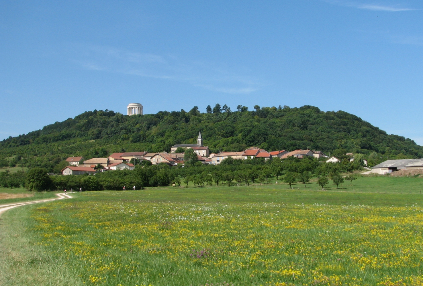 Le village de Montsec dans la Meuse, avec le mémorial américain au sommet de la butte